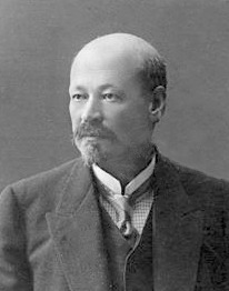 Nikolai Matveevich Kischner (27 November 1867 – 28 November 1935)